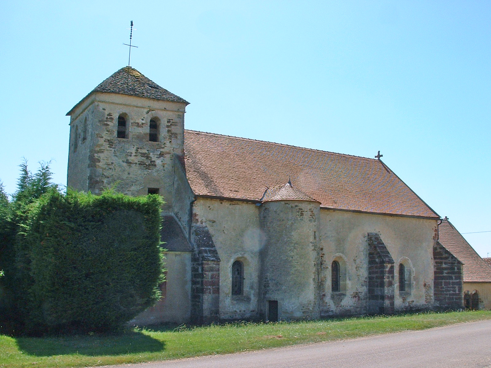 Église de Vignes, Yonne